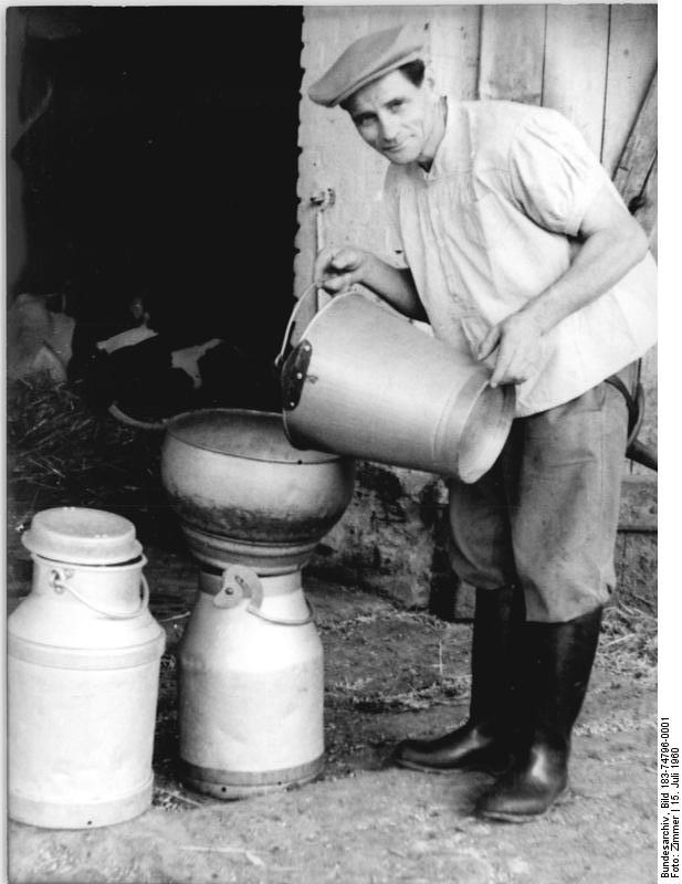 Kutzleben, Bauer beim Abfüllen von Milch Zentralbild Zimmer 15.7.1960 Vorbildlicher Melkermeister. Ausgehend von der Losung "Mais-Milch-Überfluß" unternimmt Melkermeister Kurt Nehlert von VE Saatzuchtgut Kutzleben im Kreis Bad Langensalza große Anstrengungen, um hohe Leistungen zu erzielen. Heute schon sind im VEG Kutzleben Kühe mit einer durchschnittlichen Milchleistung von 7.000 kg und mehr keine Seltenheit.- Melkermeister Nehlert, der 54 Milchkühe betreut, und den Stall im Jahre 1951 mit einer Durchschnittsleistung vom 3 100 kg übernahm, hatte schon im vergangenen Jahr eine Stalldurchschnittsleistung von 4 760 kg, die er in diesem Jahr durch vorbildliche Pflege, richtige Fütterung und gute Betreuung der Tiere auf 4 800 kg erhöhen will. UBz: Melkermeister Nehlert vom VEG Kutzleben füllt durch seine vorbildliche und gewissenhafte Arbeit so manche Milchkanne und trägt dazu bei, dass der Plan im Marktaufkommen bei Milch erfüllt wird.